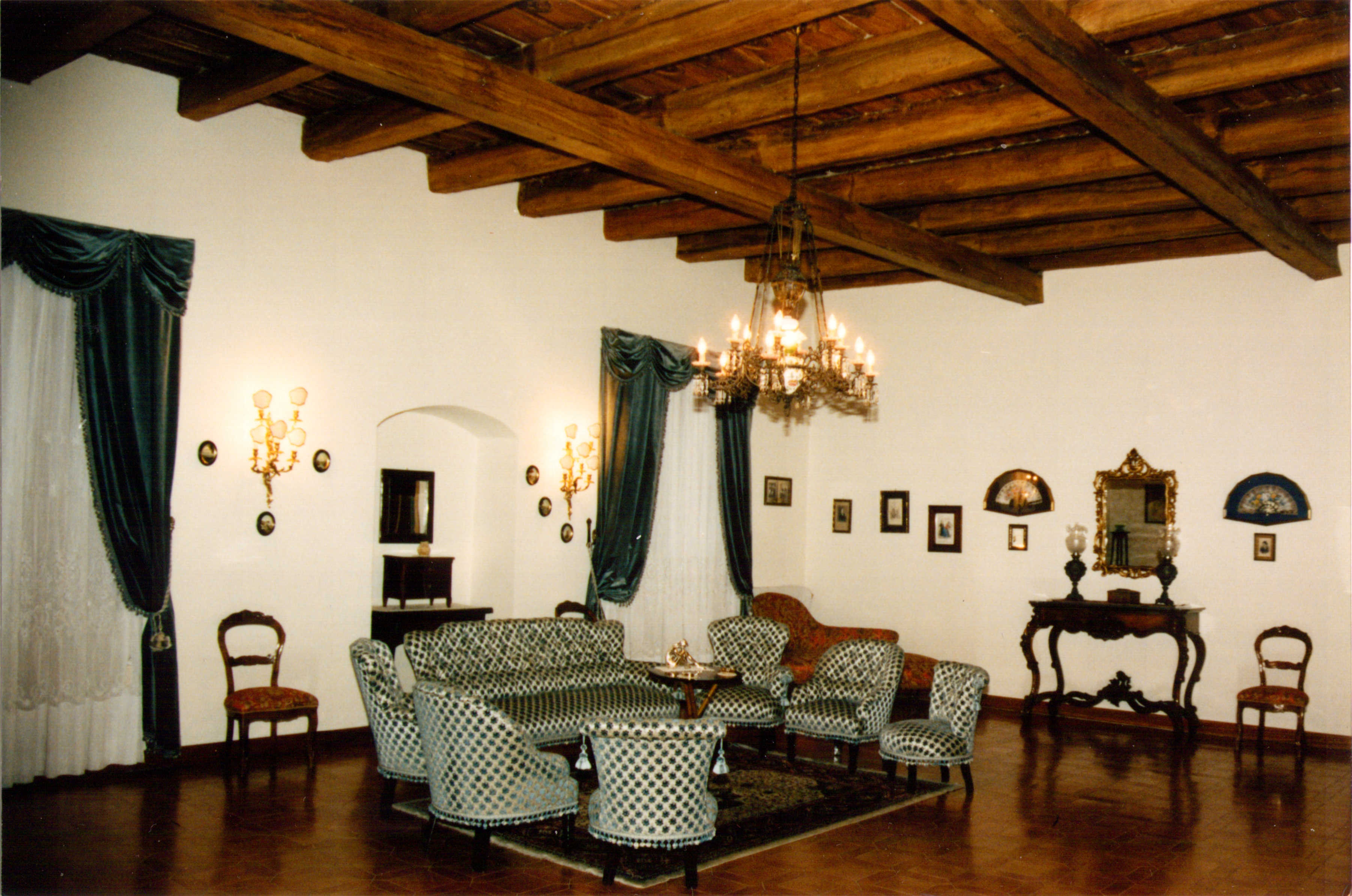 Il salone del primo piano nobile nell'allestimento degli anni '90